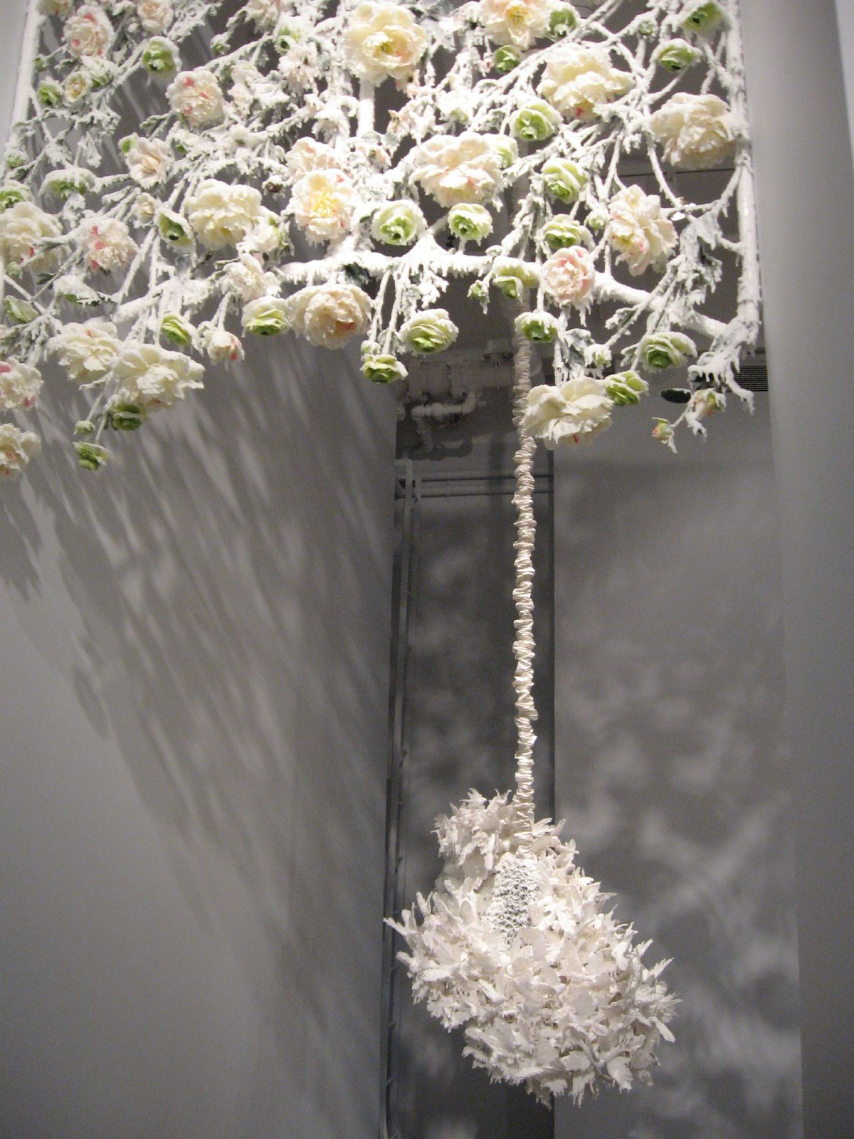 Unforgiven